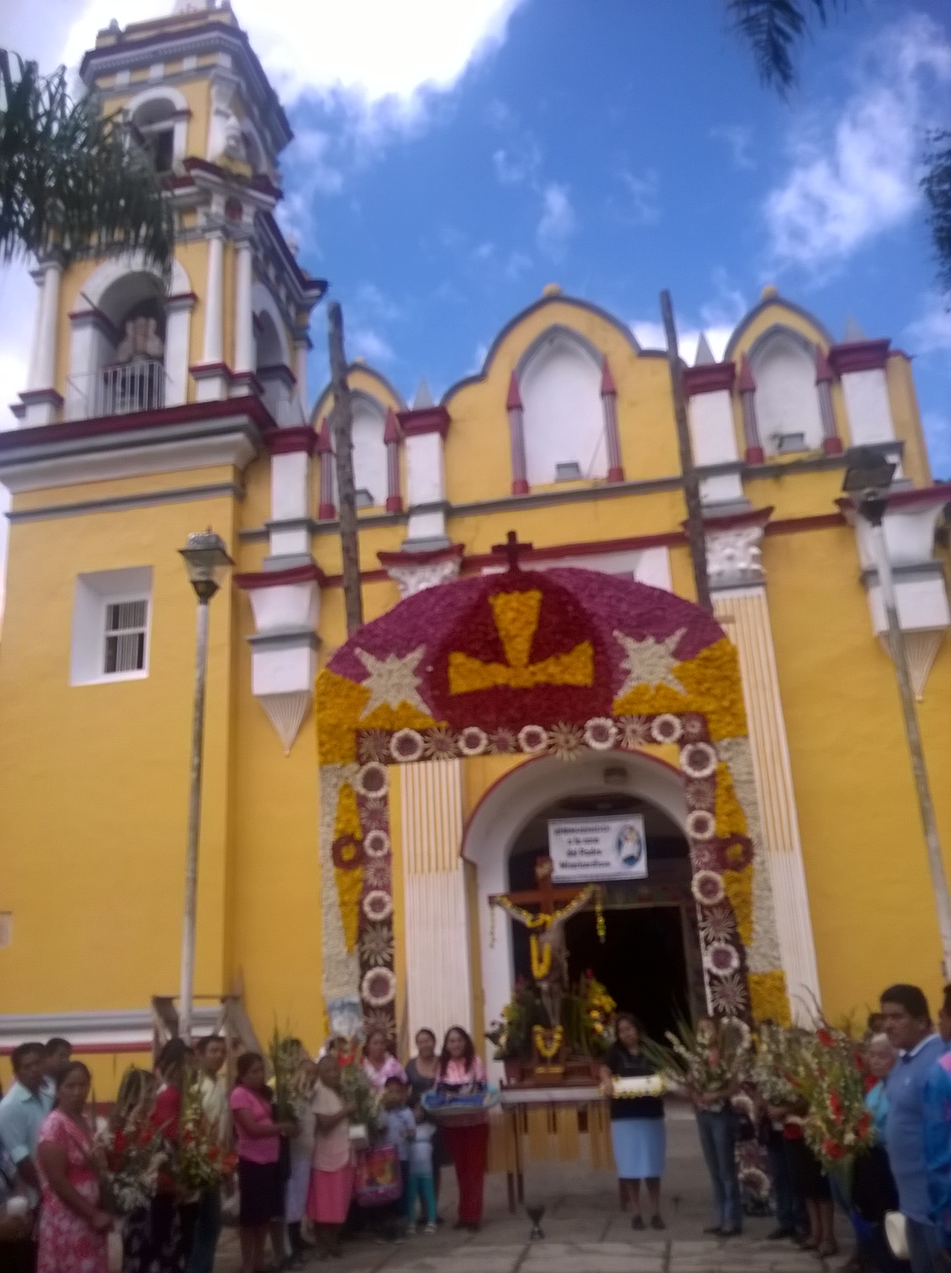 Parroquia de San Francisco de Asís en Zongolica, Veracruz